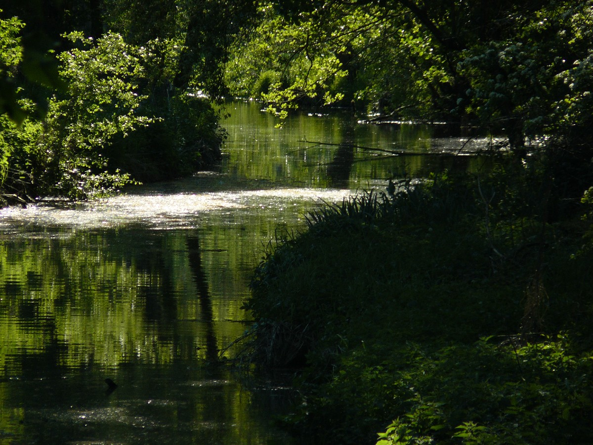 NSG „Aueniederung und Nebentäler“ bei Harsefeld